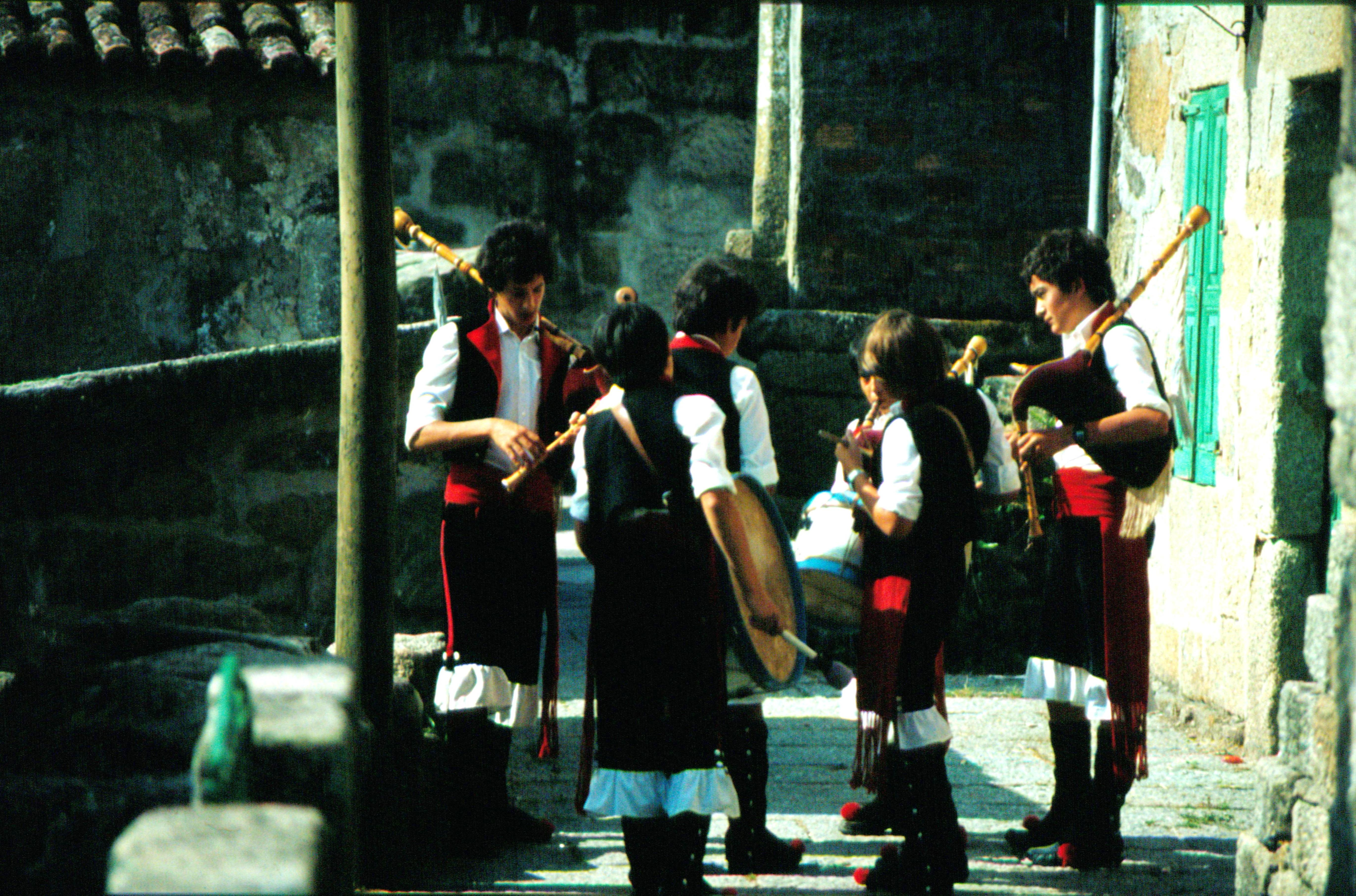 junge Dudelsackspieler in Nordwestspanien